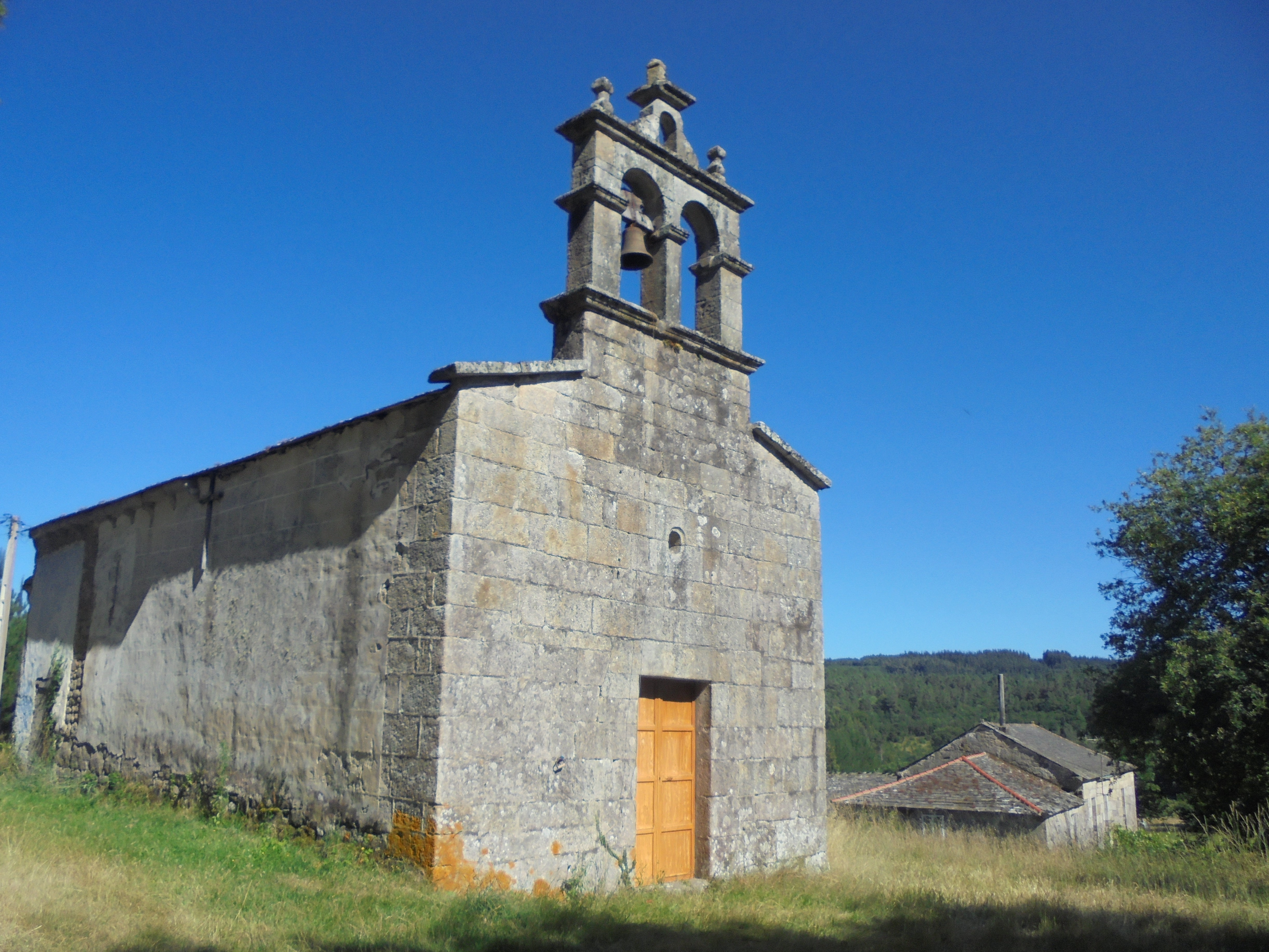 Igrexa parroquial de Fonteita ( O Corgo)